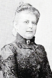 Porträt von Selma von der Heydt (1862-1944)